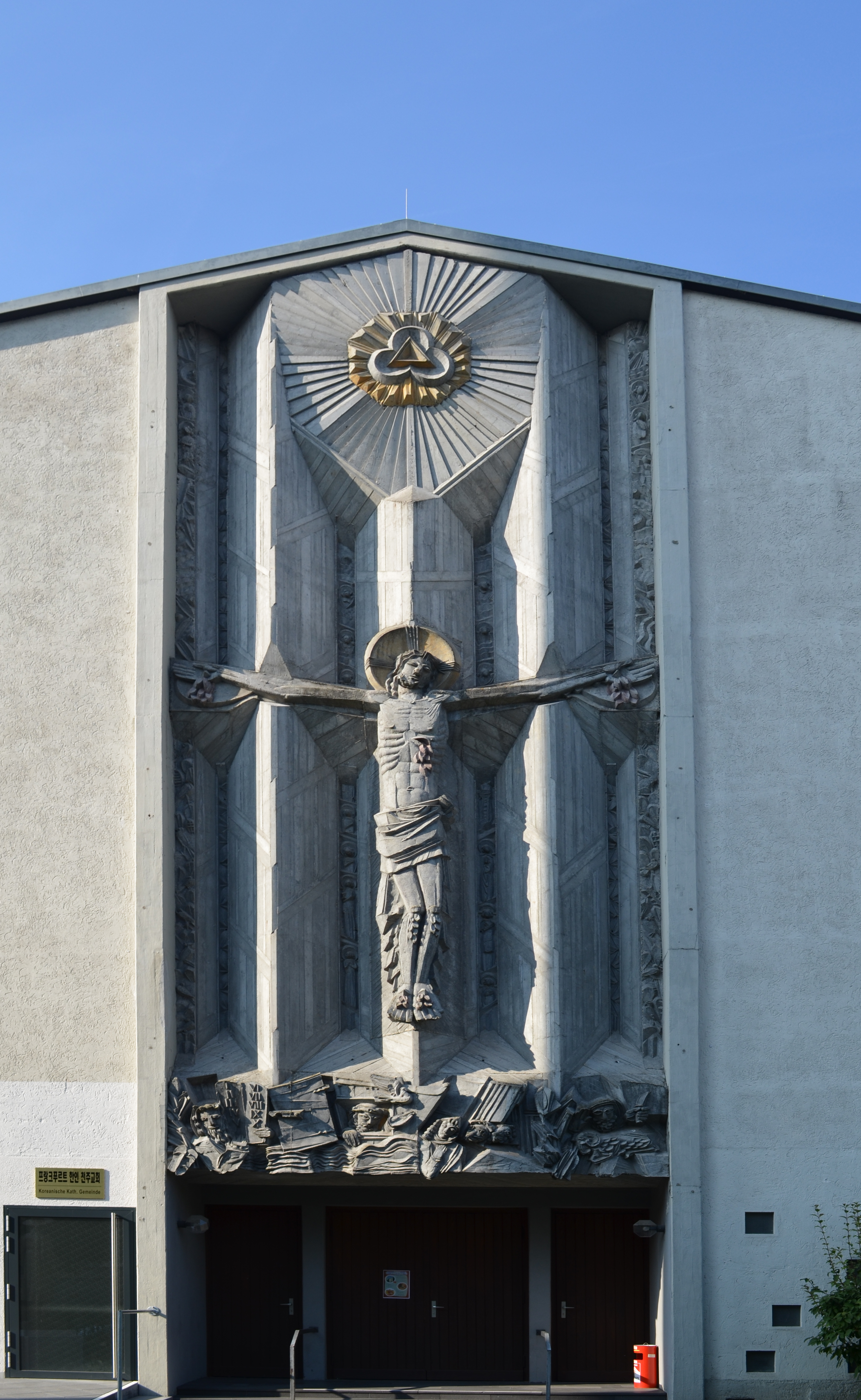 Frankfurt, St. Albert, Eingang mit Architekturplastik „Christus – Friede und Heil für alle“ über dem Hauptportal. Zu sehen sind links Moses mit den Gesetzestafeln und rechts Abrahams Opferung des Widders.